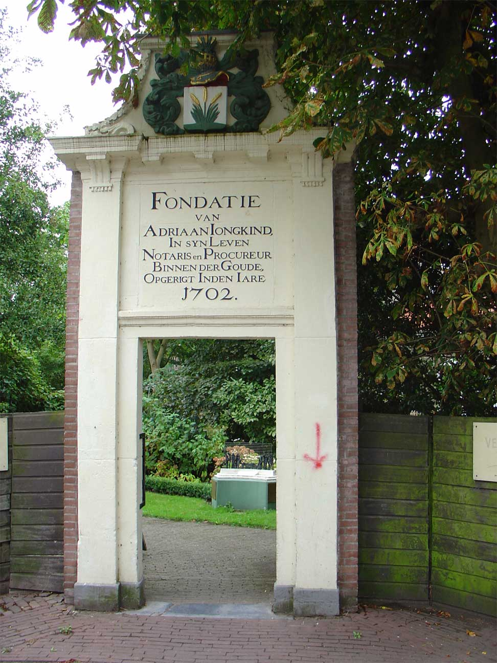 Het poortje van het voormalig hofje van Jongkind aan de Zeugstraat te Gouda, het poortje vormt thans de ingang tot de tuin van het verzetsmuseum te Gouda en staat in de Vrouwesteeg aldaar